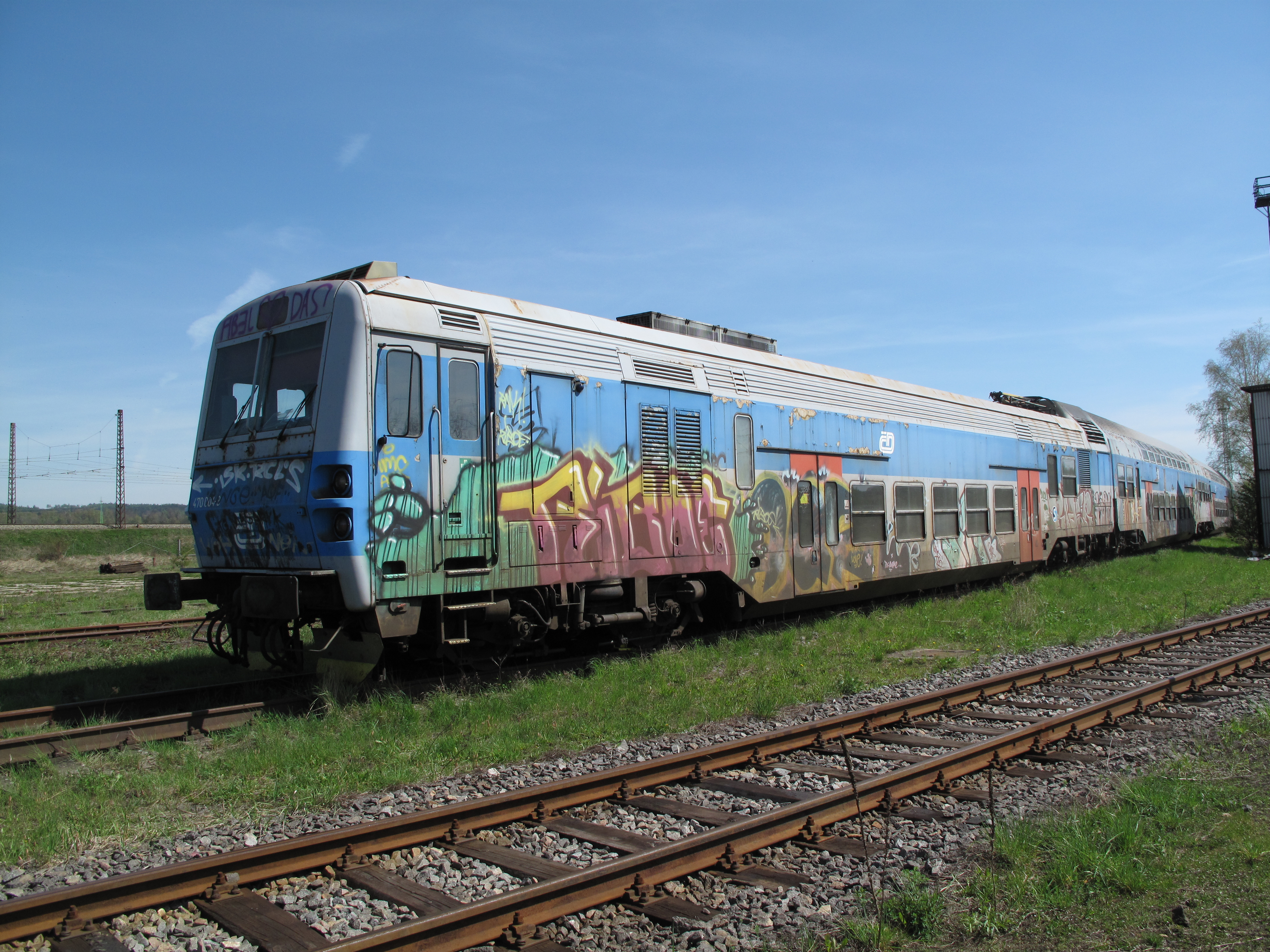 Jednotka 470 v České Třebové